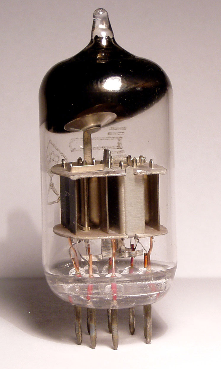 Eine russische Spanngitterröhre mit Detailansicht eines Triodensystems.